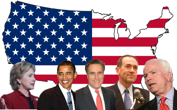 Kandidater i presidentvalget i USA